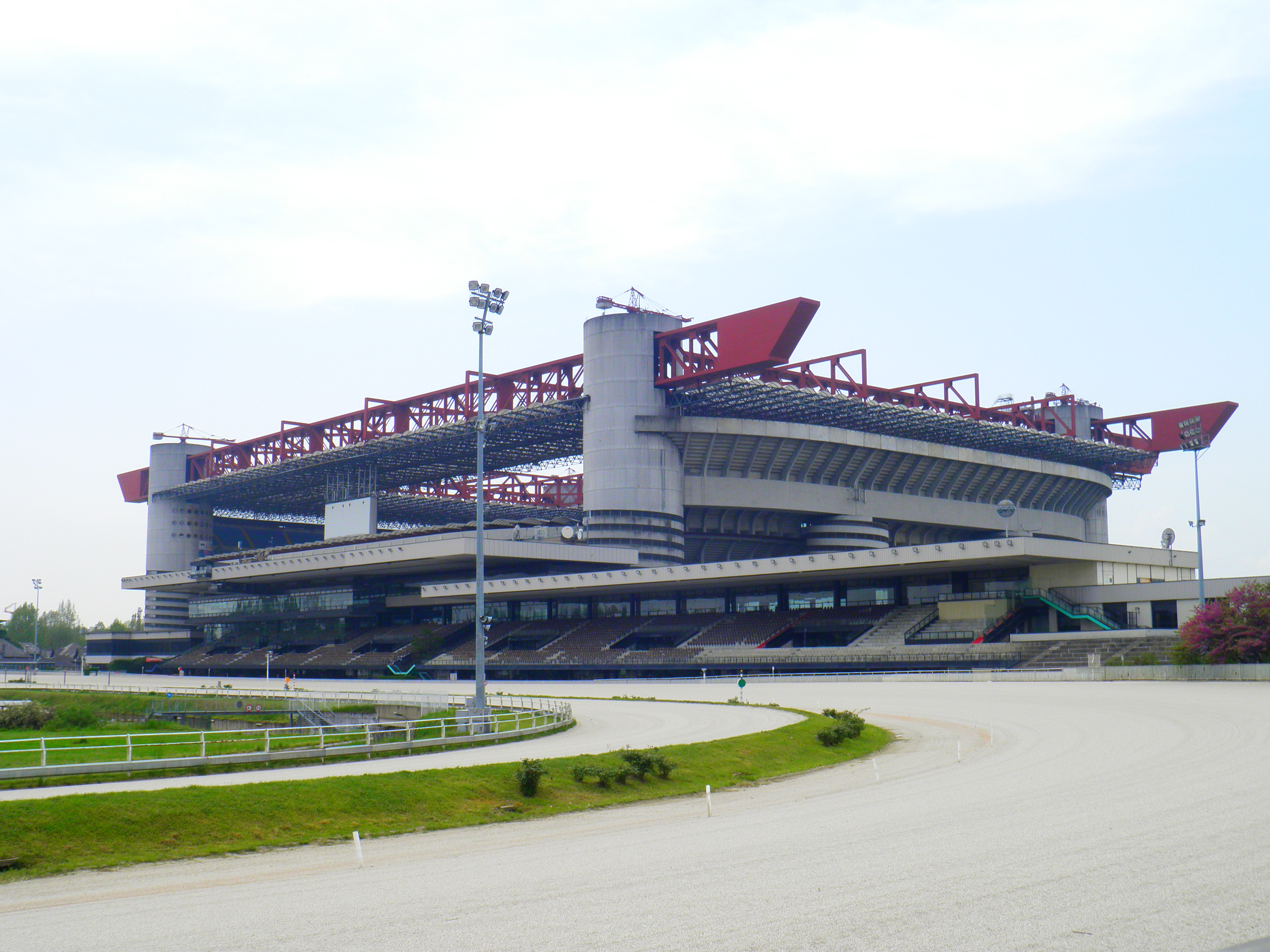 San Siro